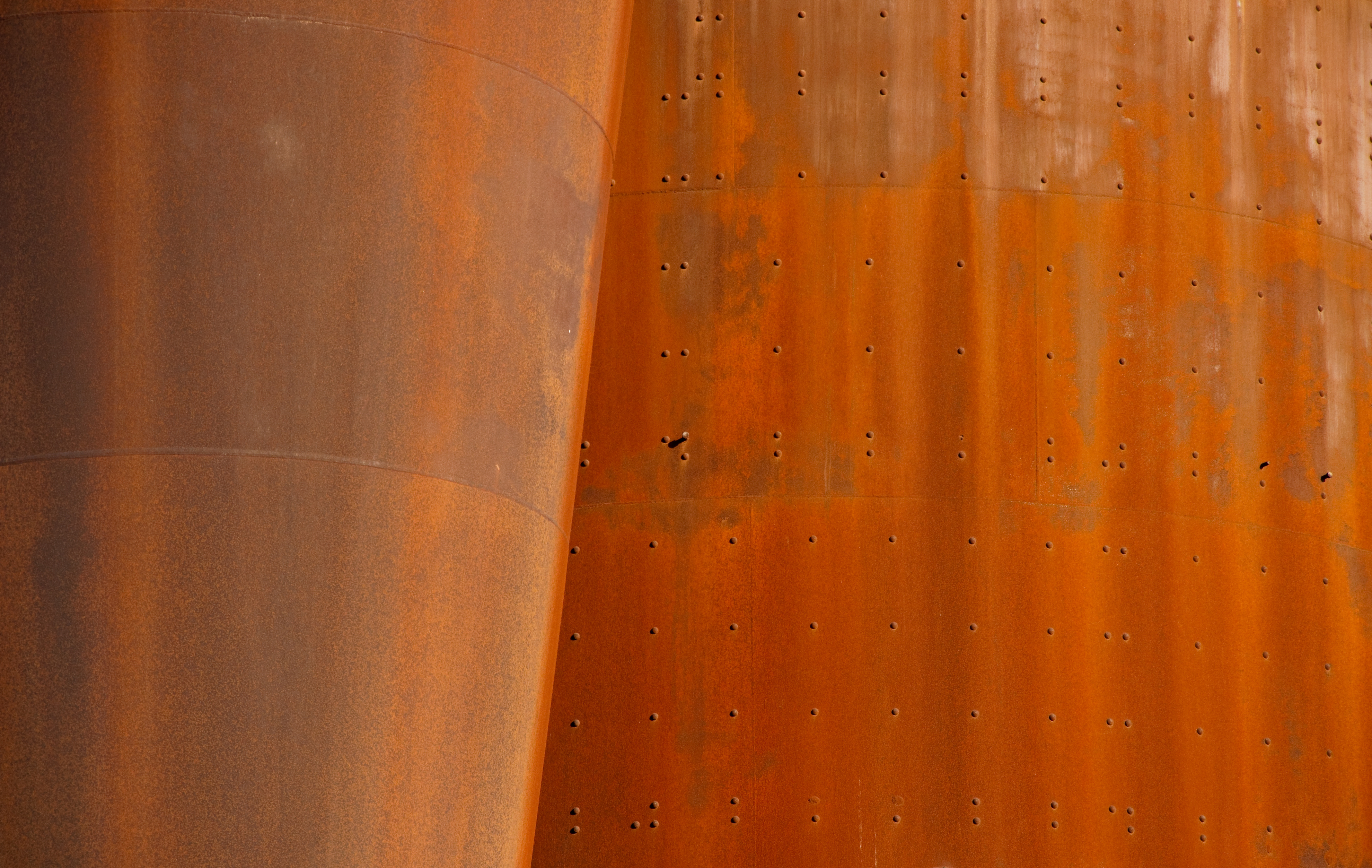 Wirbler (links) und Staubsack beim Hochofen 5 im Landschaftspark Duisburg-Nord